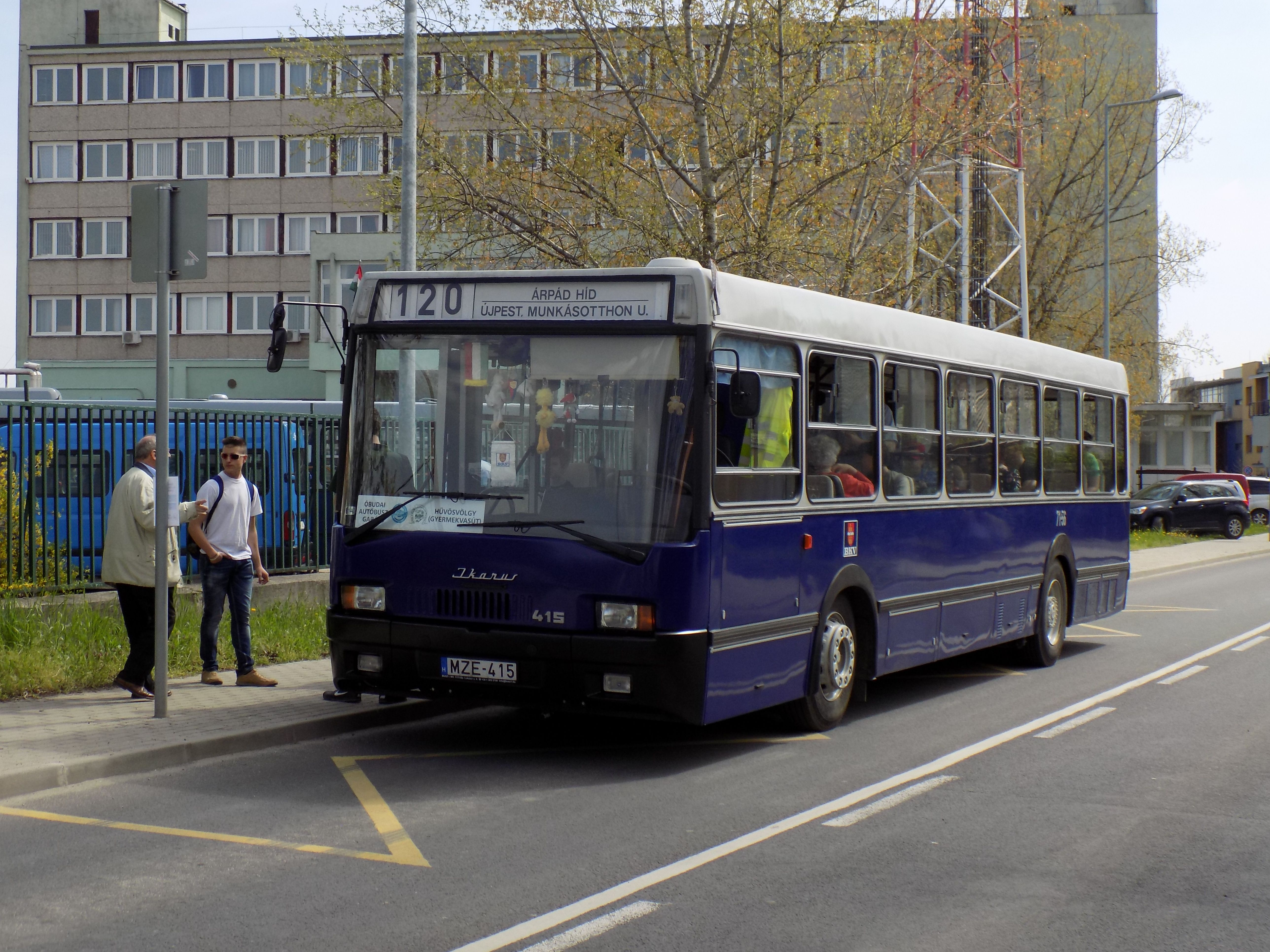 Ikarus 415-ös nosztalgiabusz az óbudai nyílt napon